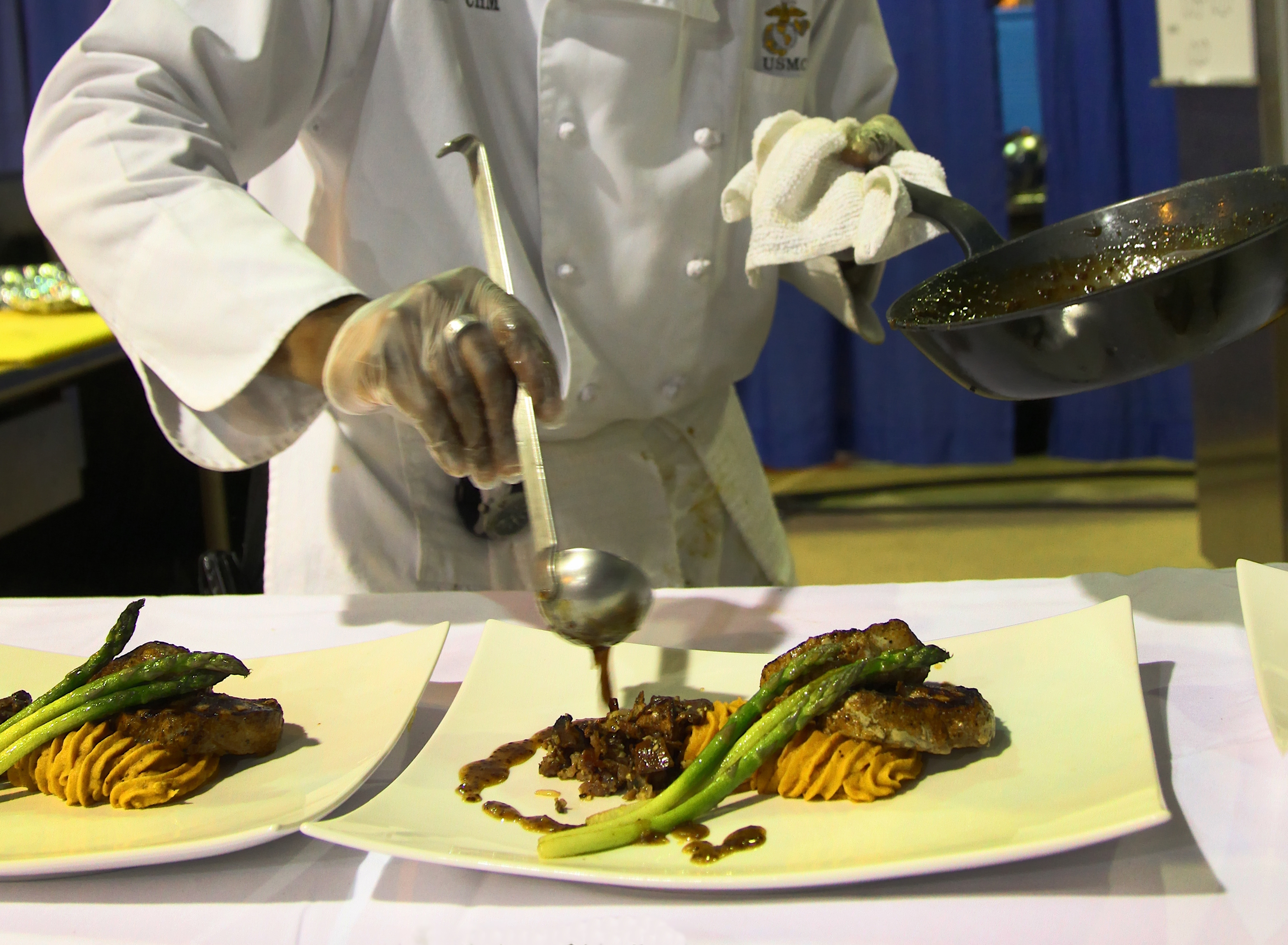 Saucieren eines Fleischgerichts vorm Servieren, hier mit eingedickter Bratensauce bei einem aus Schweinemedaillons und Beilagen bestehenden Hauptgericht.